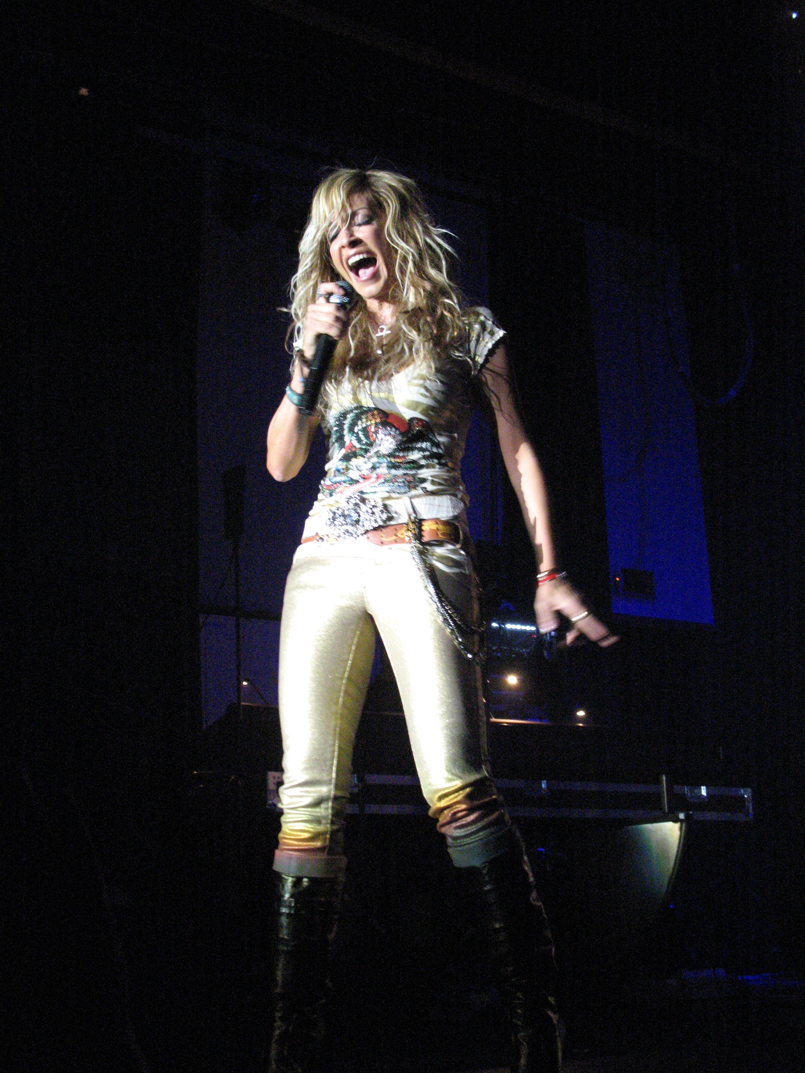 Anna Vissi; Oktober 5, 2007; Melkweg Amsterdam